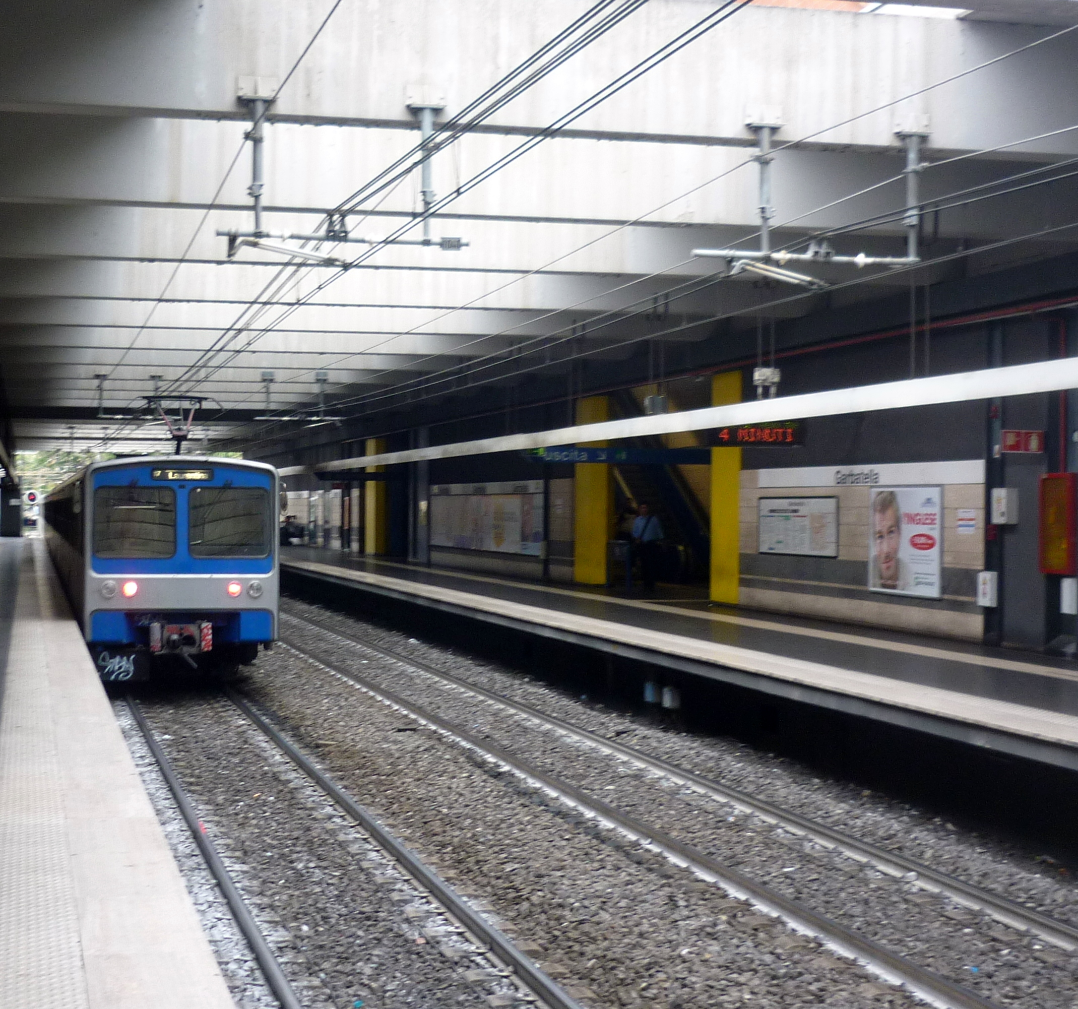 Metro train at Garbatella station, Rome